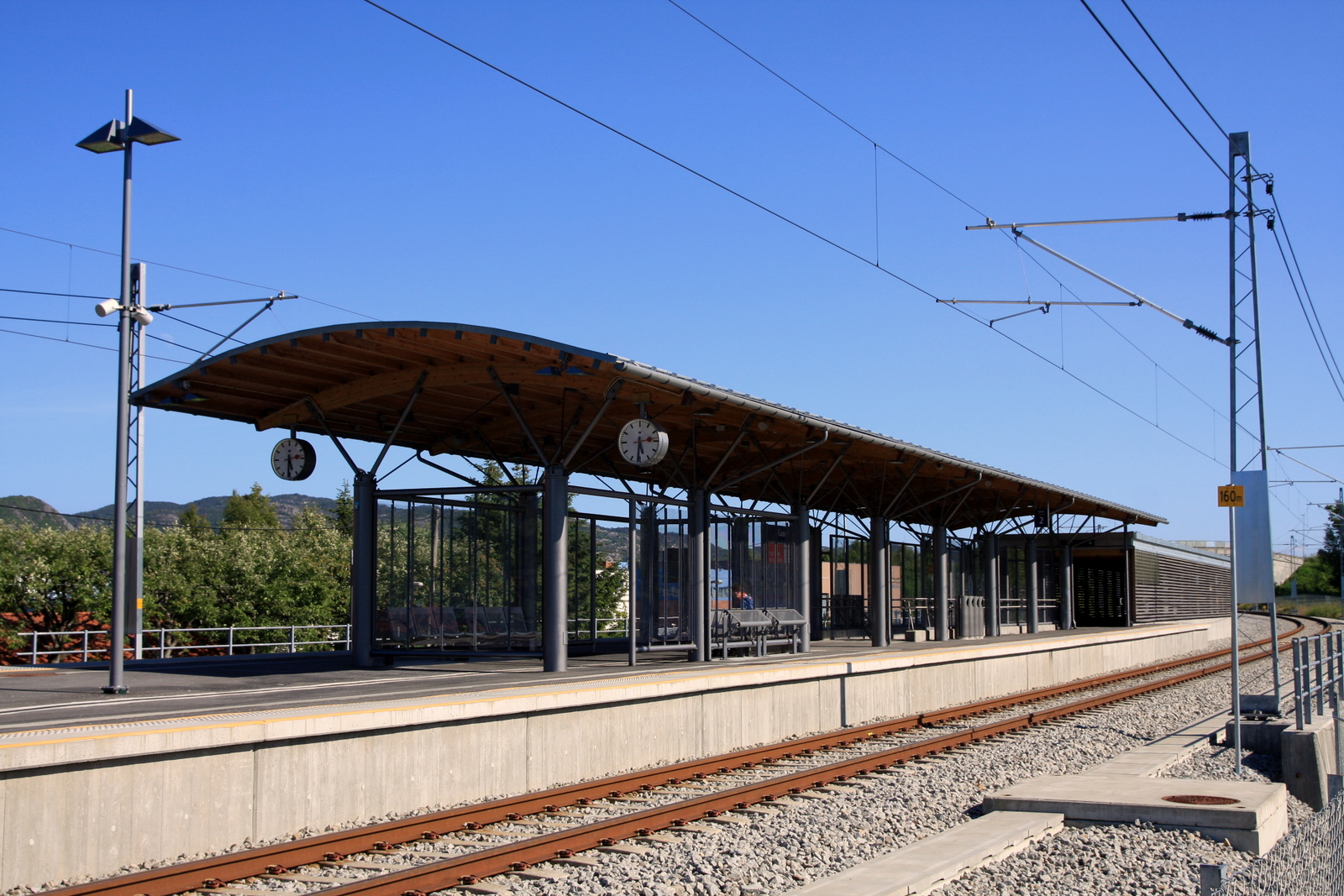 Gausel_holdeplass